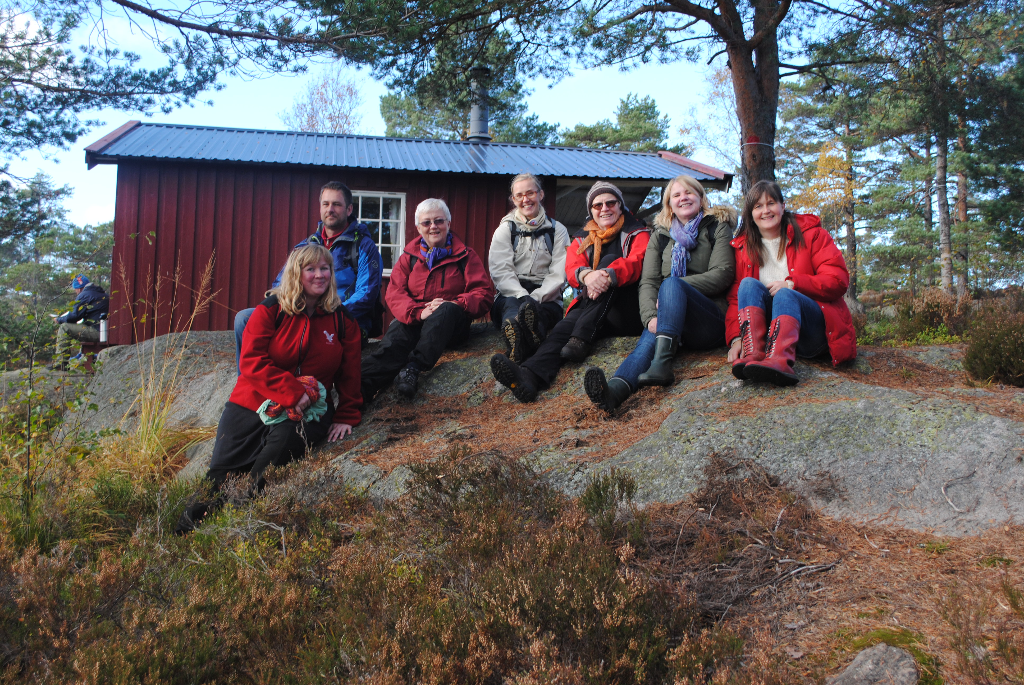 En del av staben ved AAbk på Olandsbu turisthytte ifm åpningen av Barnas Fjellbibliotek der i 2013.